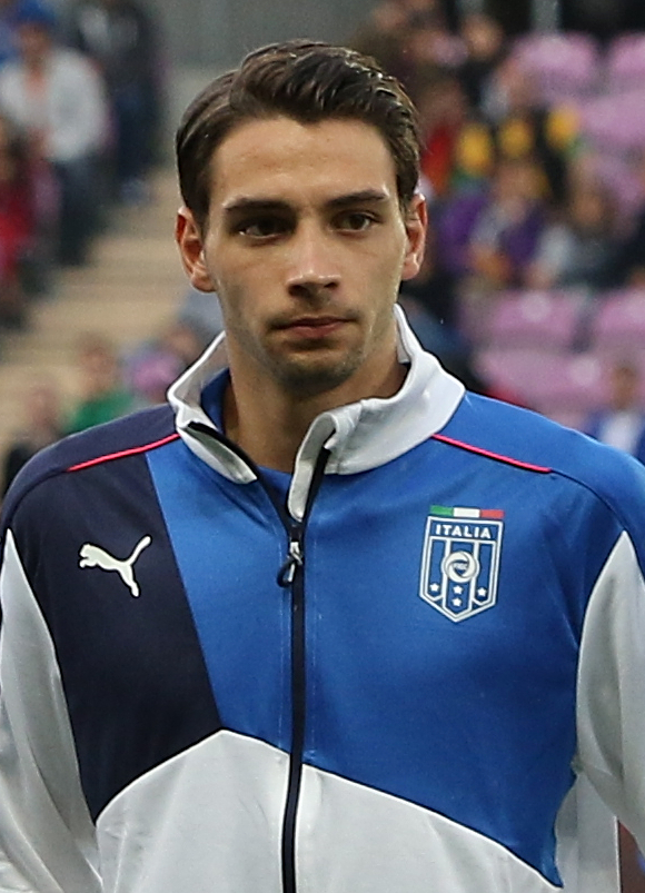 20150616 - Portugal - Italie - Genève - Mattia De Sciglio